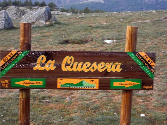 Cartel de la altimetria del puerto de La Quesera (Segovia). Foto hecha en la cima del puerto de la quesera en agosto de 2009.